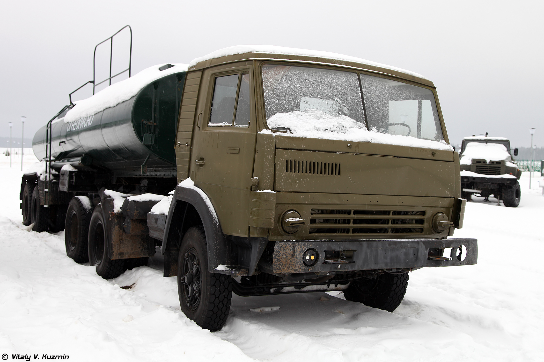 Неидентифицированная полуприцеп-цистерна для перевозки горючего (Unidentified fuel tank towed by KAMAZ)